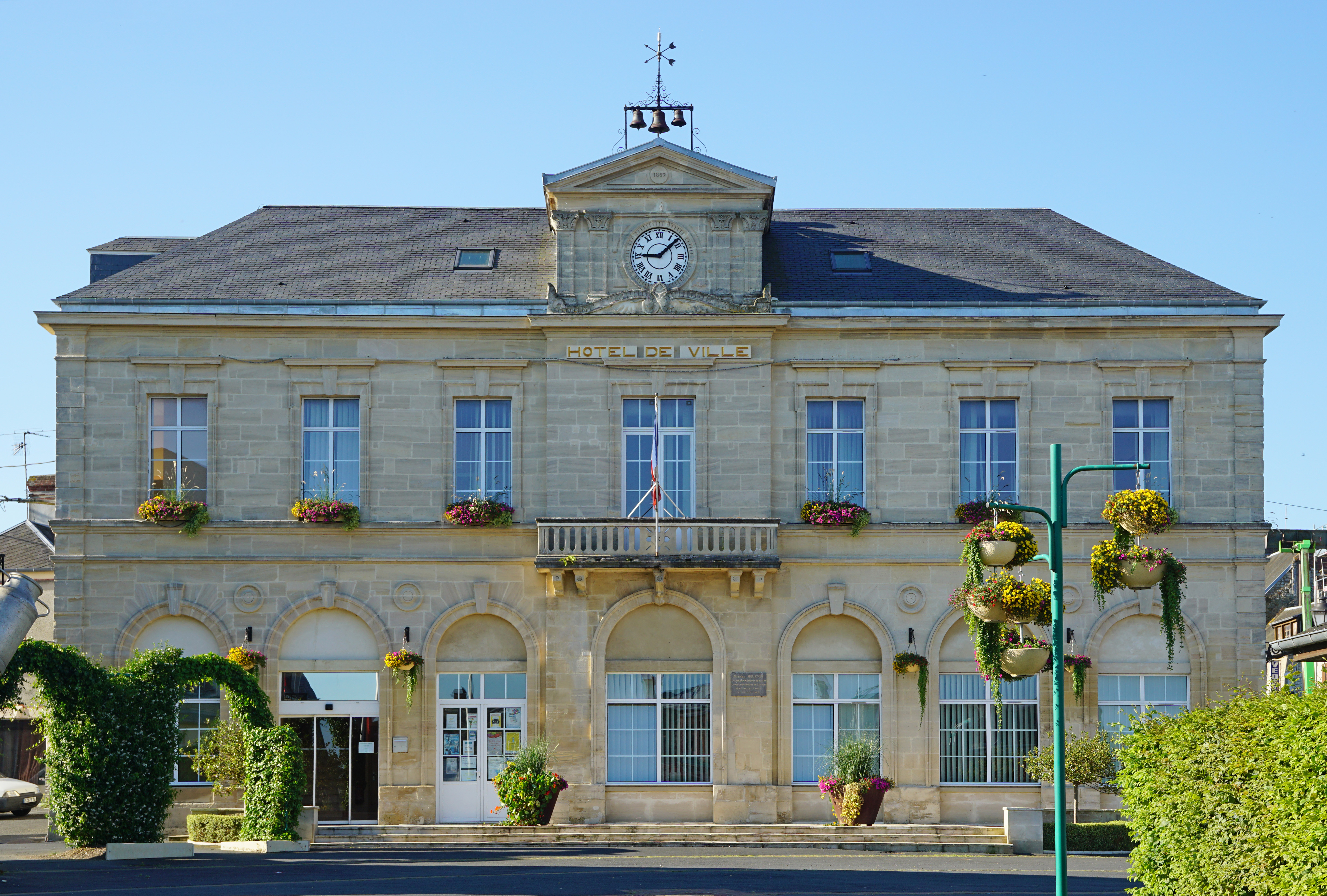 Mairie de Le Molay-Littry.